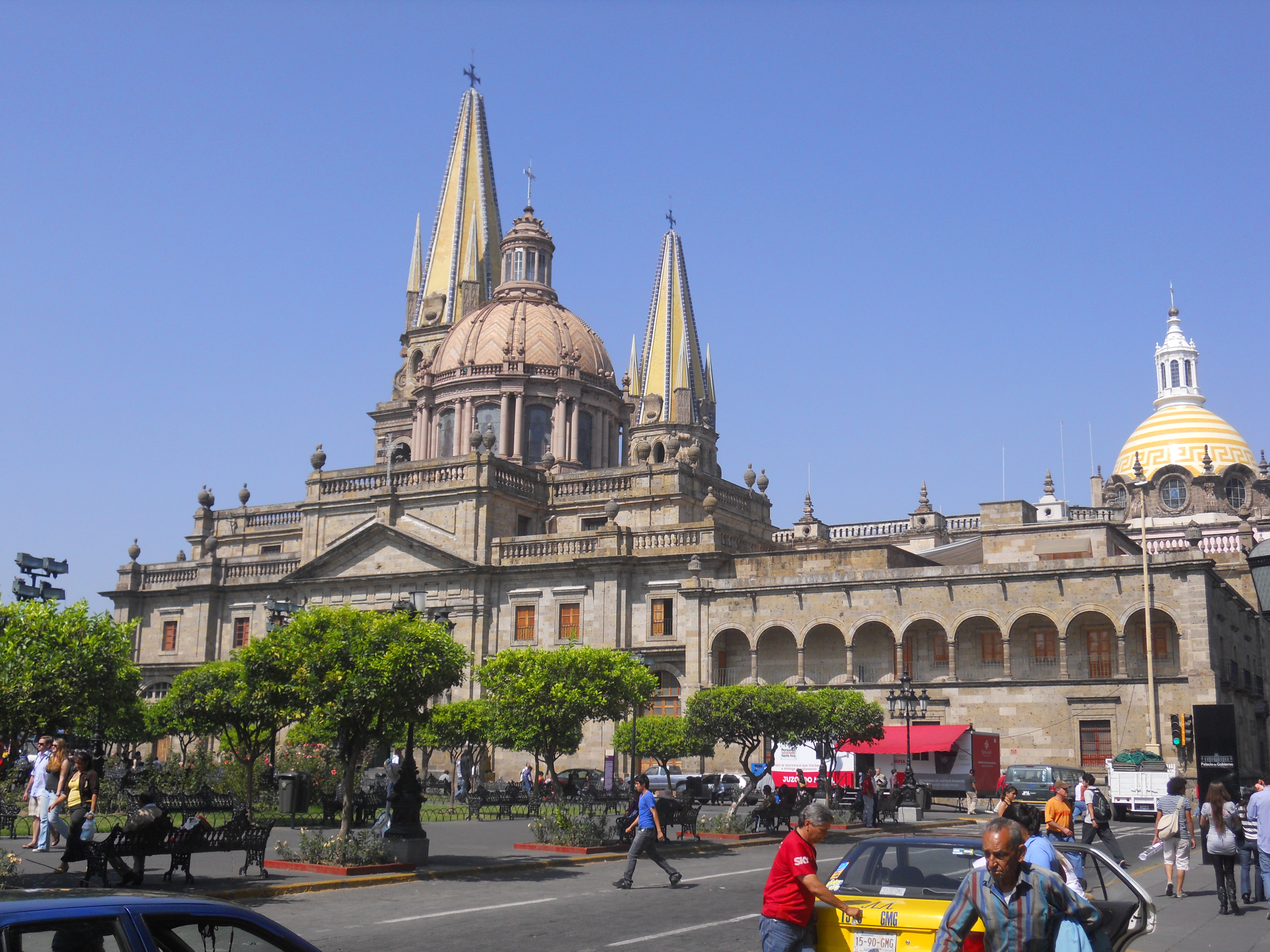 Catedral de Guadalajara